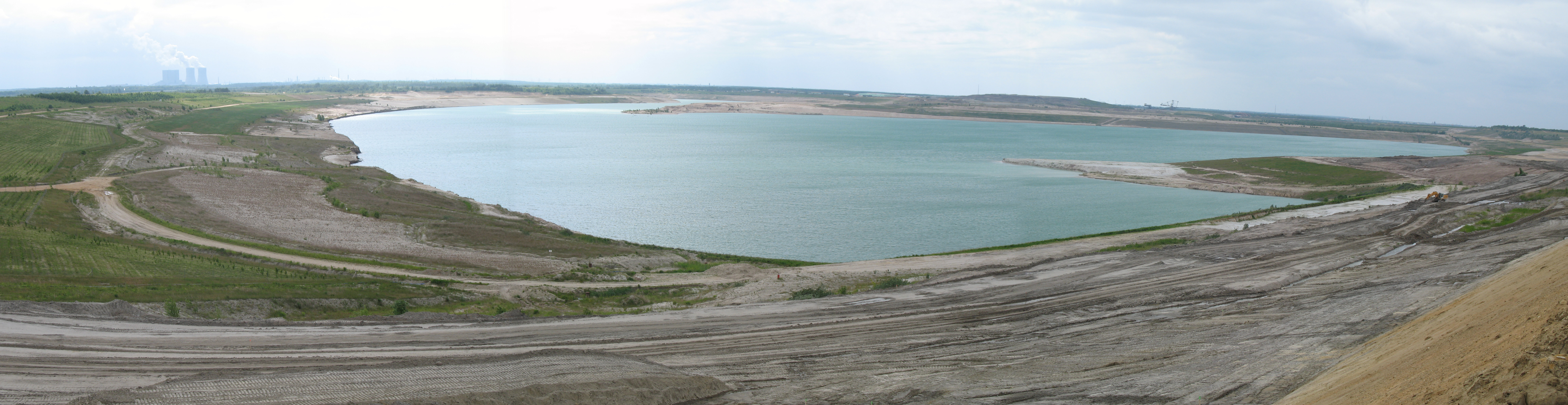 Panorama Störmthaler See 4. Juni 2006